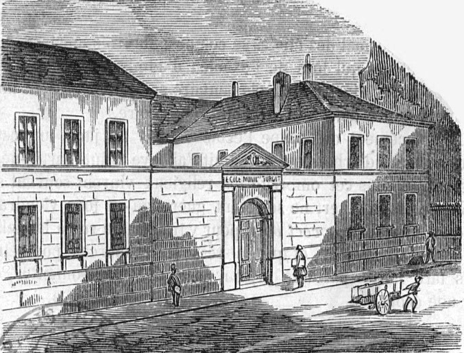 Façade de l’École Turgot (première école primaire supérieure de Paris), rue du Vertbois, avant le percement de la rue de Turbigo.